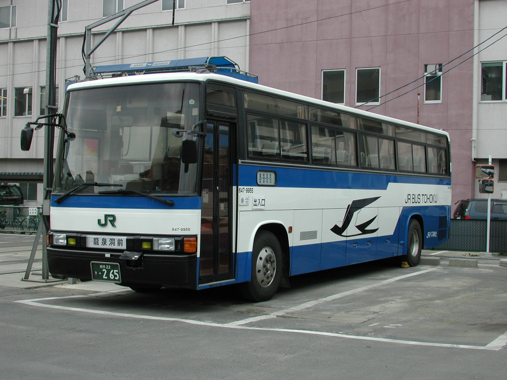 早坂高原線 盛岡支店にて、許可を得て撮影